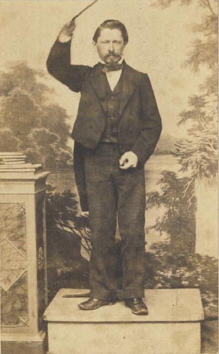 Porträt des Rudolph Tschirch